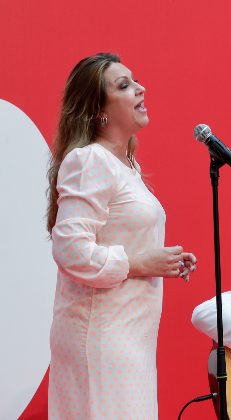 Imposición de la Medalla de la Comunidad de Madrid y Condecoraciones de la Orden del 2 de a los premiados: Medalla de la Comunidad de Madrid, en su categoría de Oro; Alejandro Sanz y Javier Fernández. Medalla de Plata de la Comunidad de Madrid; Cuerpo de Bomberos de la Comunidad de Madrid y Jefatura Superior de Policía de Madrid. Orden del Dos de Mayo; Lorenzo Silva y doctor Jesús Vaquero, en el grado de Gran Cruz; los seis Institutos de Enseñanza Secundaria históricos de Madrid (Cervantes, Cardenal Cisneros, Isabel la Católica, Ramiro de Maeztu, Lope de Vega y San Isidro) y la Unidad de Trastornos del Comportamiento Alimentario del Hospital Infantil Universitario Niño Jesús, en el grado de Encomienda de Número. La condecoración en el grado de Cruz será para la Red Natura 2000 y para la empresa Talgo.